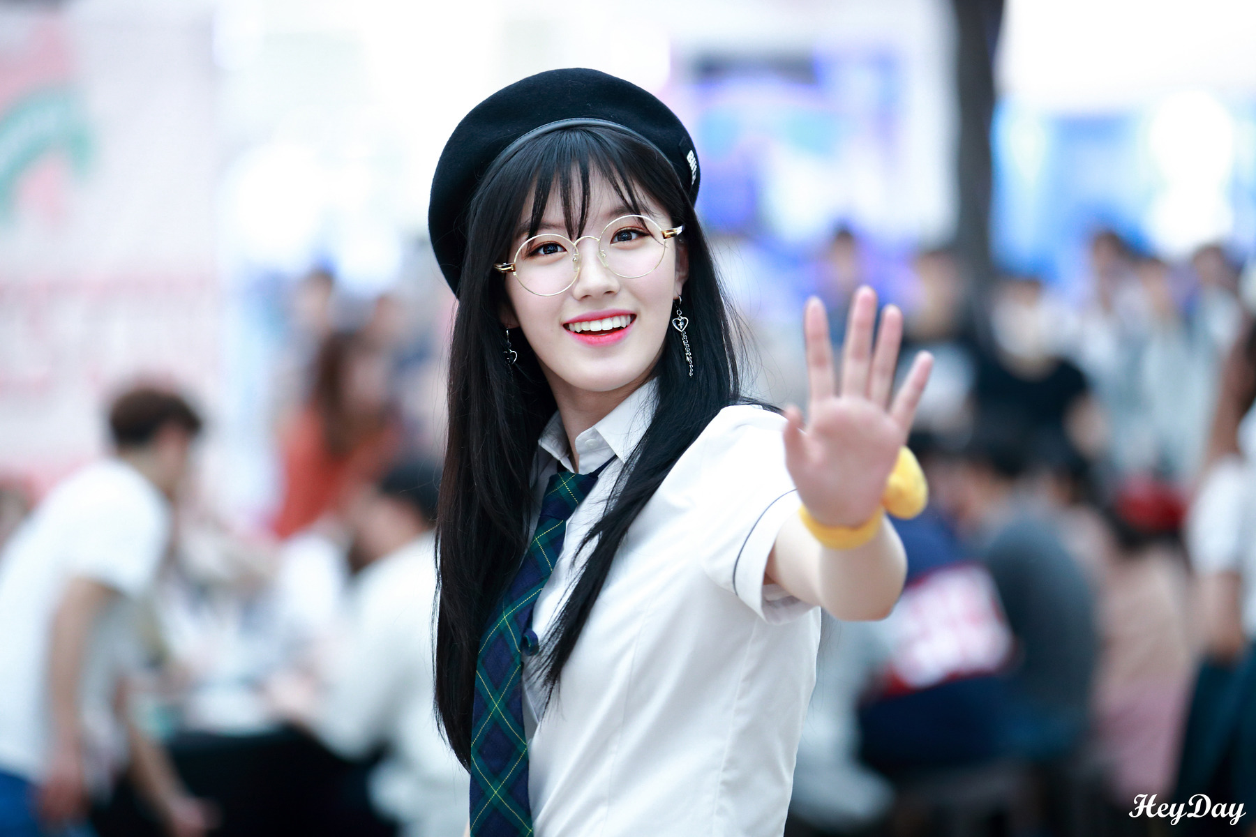 한국어 (조선): 170910 프리스틴 시연 코엑스 팬싸인회